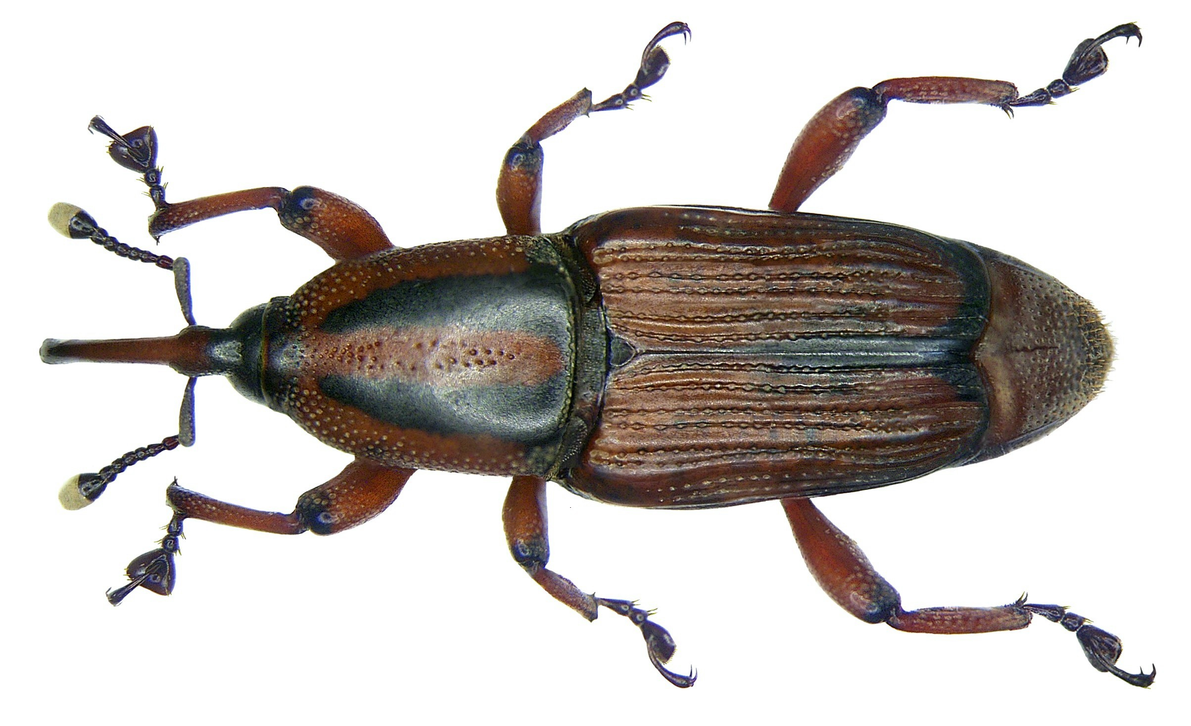 Odoiporus longicollis Oliv. Familie: Curculionidae Grösse: 13 mm Fundort: Thailand, Khao Lak leg. det. U.Schmidt, 2007 Foto: U.Schmdit, 2008